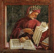 Barnabas İncil'inde yer alan ifadelerin Dante'nin söylemlerine çok benzediklerini araştırmacılar farketmiştir.